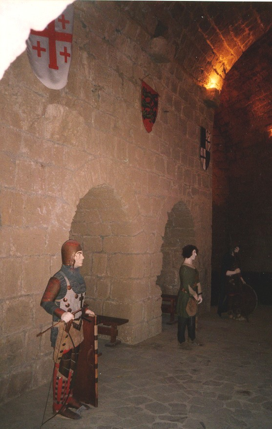 Museo del Castillo del Kyrenia. Uniformes de los antiguos ocupantes. Imagen tomada por el cargador. Año 1998.